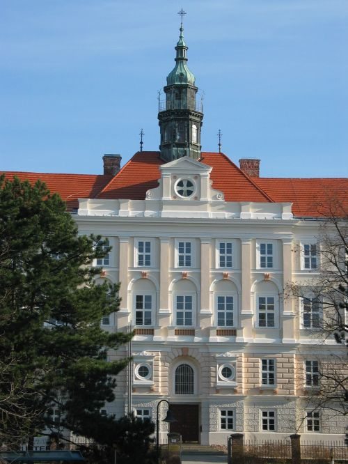 Beschreibung, Quelle und Lizenz Private Aufnahme vom Erzbischöflichen Seminar in Hollabrunn.